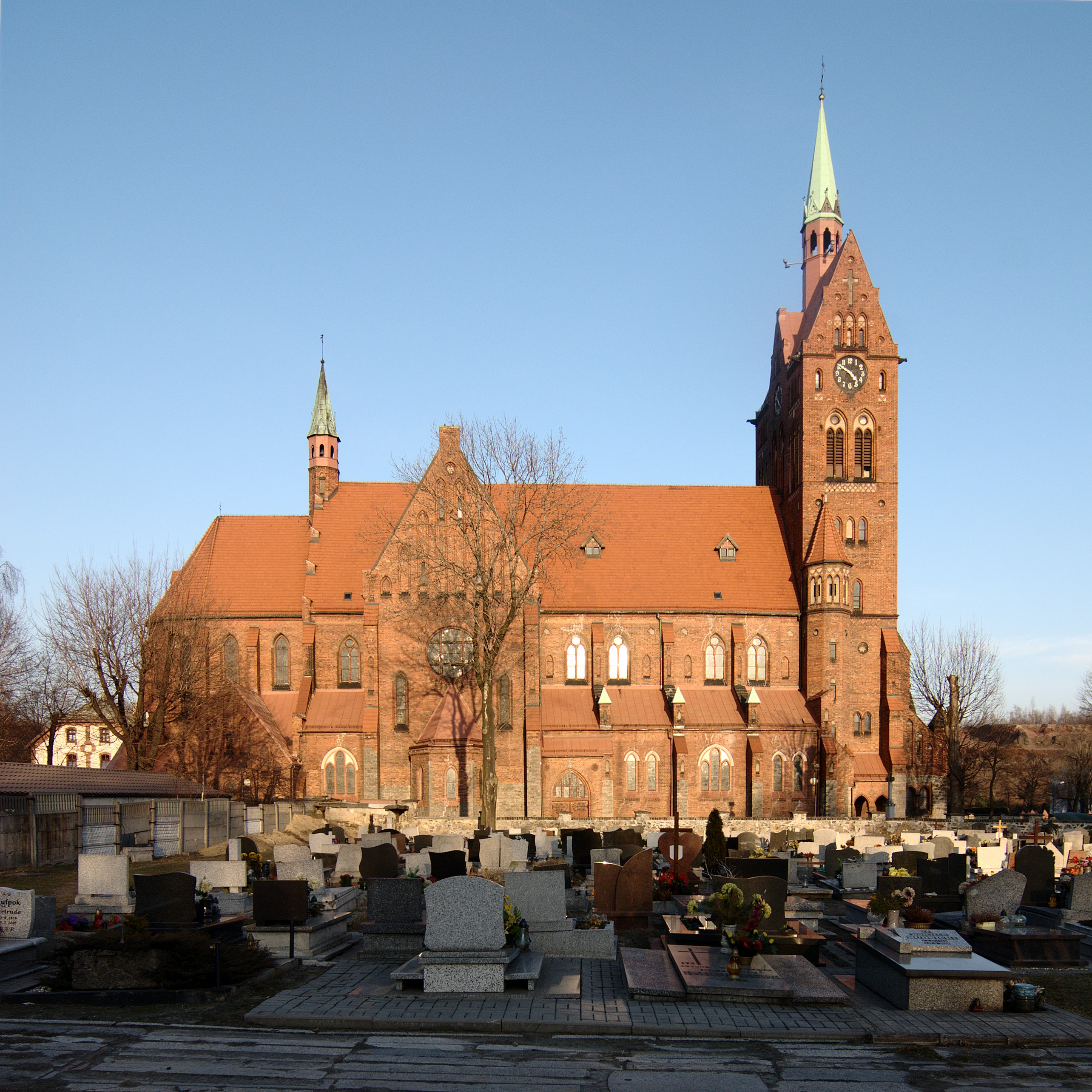 Ruda Śląska. Kościół parafialny pw. św. Wawrzyńca i Antoniego.